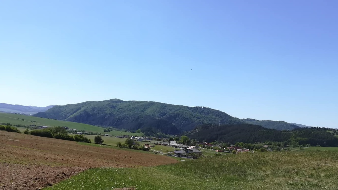 Pohľad na Skalky pri Poluvsí